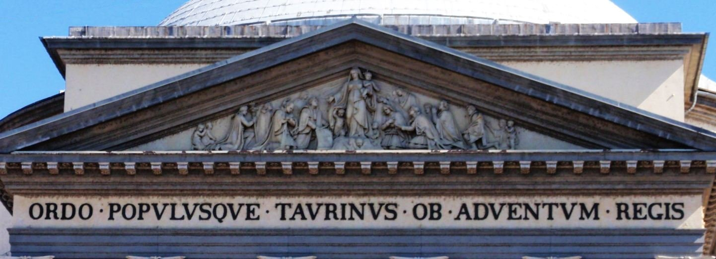 Scultura dei decurioni sulla Chiesa della Gran Madre Borgo Po Torino Italia